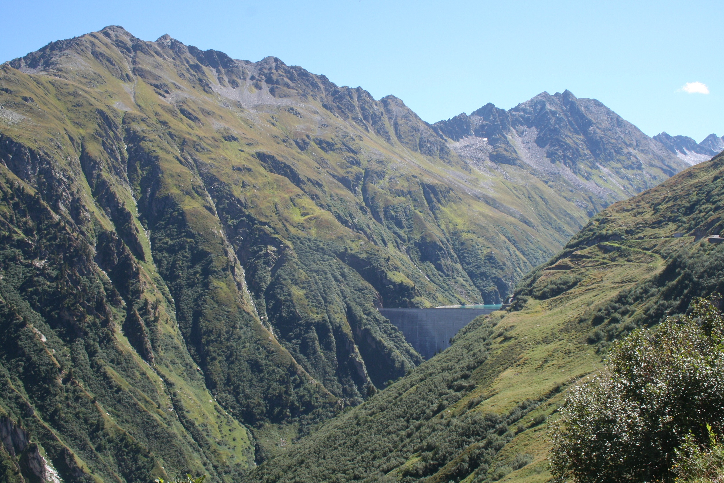 Val Curnera im Kanton Graubünden mit Staumauer des Lai da Curnera